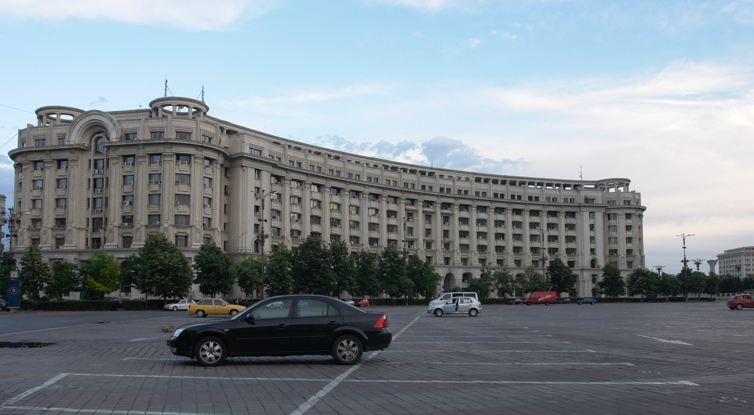 Office government building in Constitution Square (Piaţa Constituţiei)